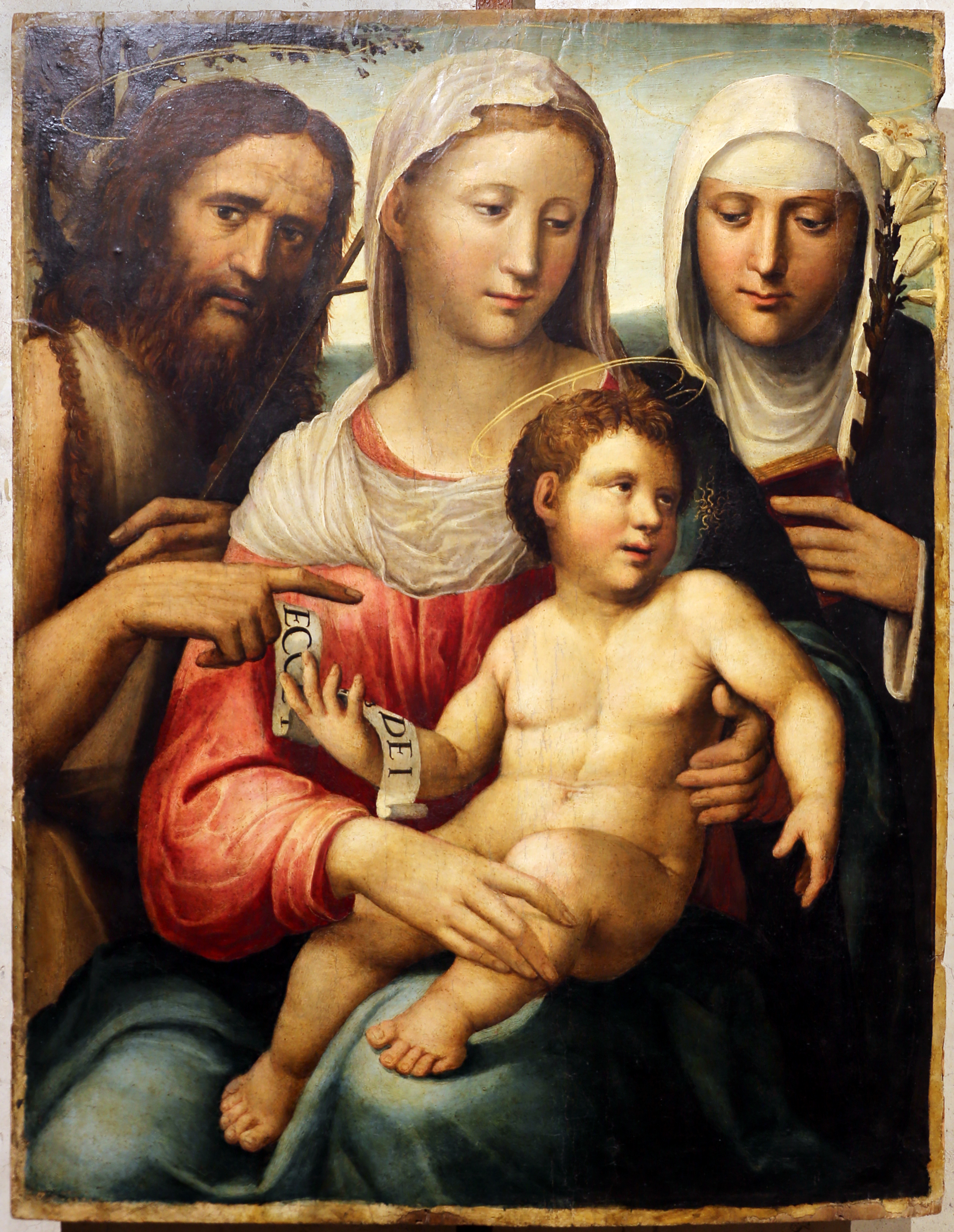 Palazzo Chigi Zondadari (San Quirico d'Orcia) This is a photo of a monument which is part of cultural heritage of Italy.